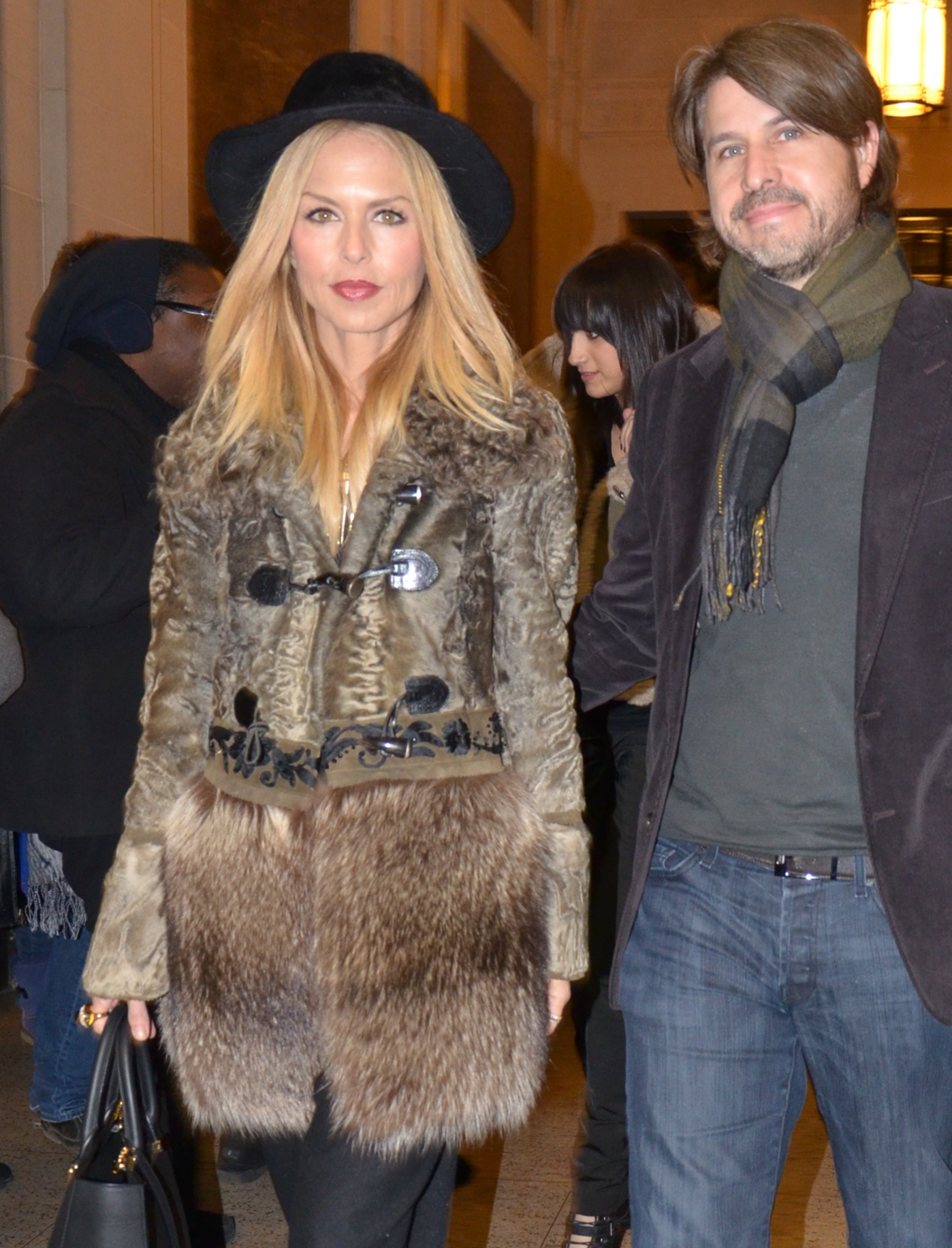 Rachel Zoe and Rodger Berman After Oscar de la Renta